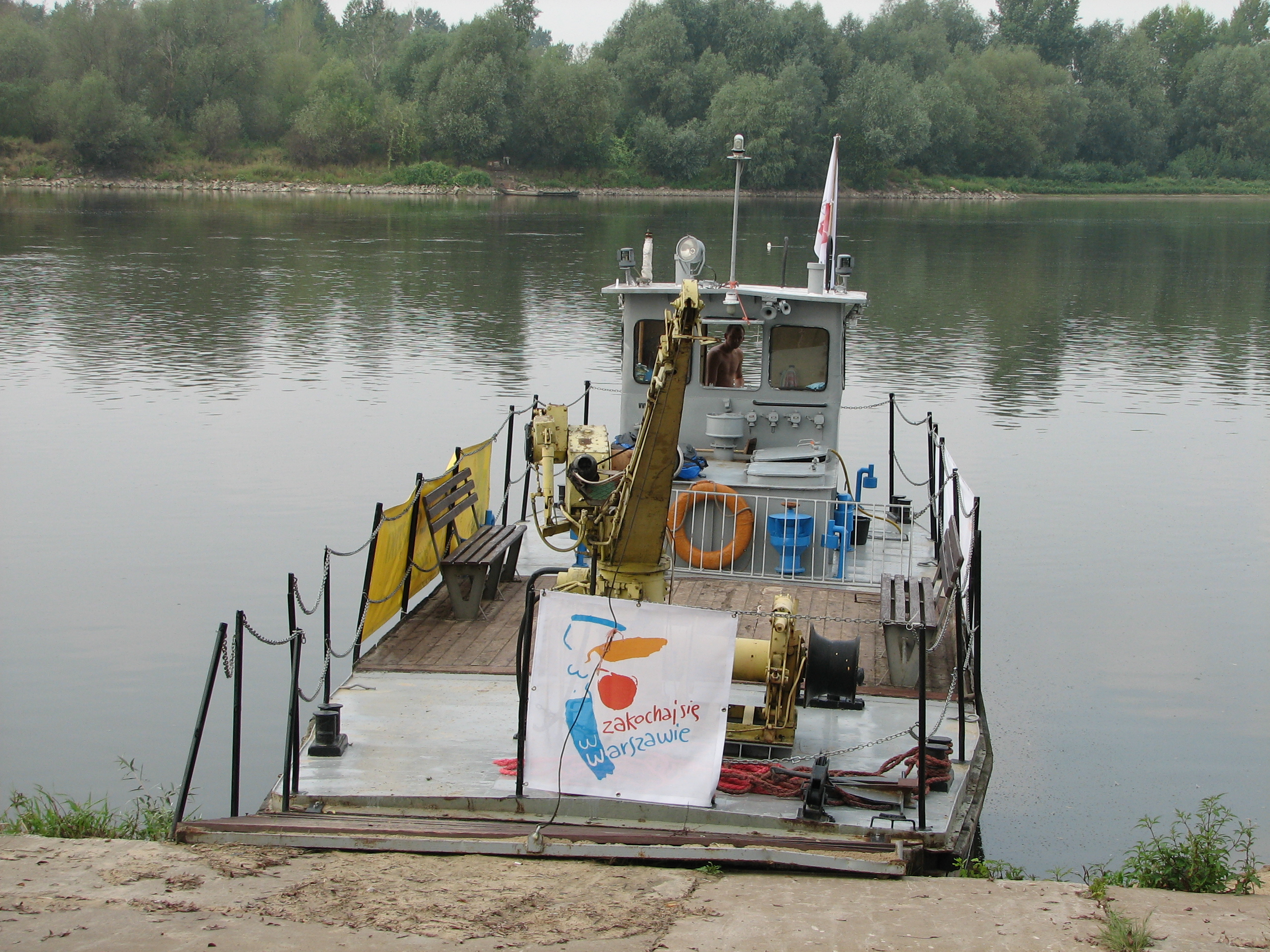 Prom rowerowy zacumowany do wiślanej przystani na warszawskich Nowodworach. Sierpień 2007 r.